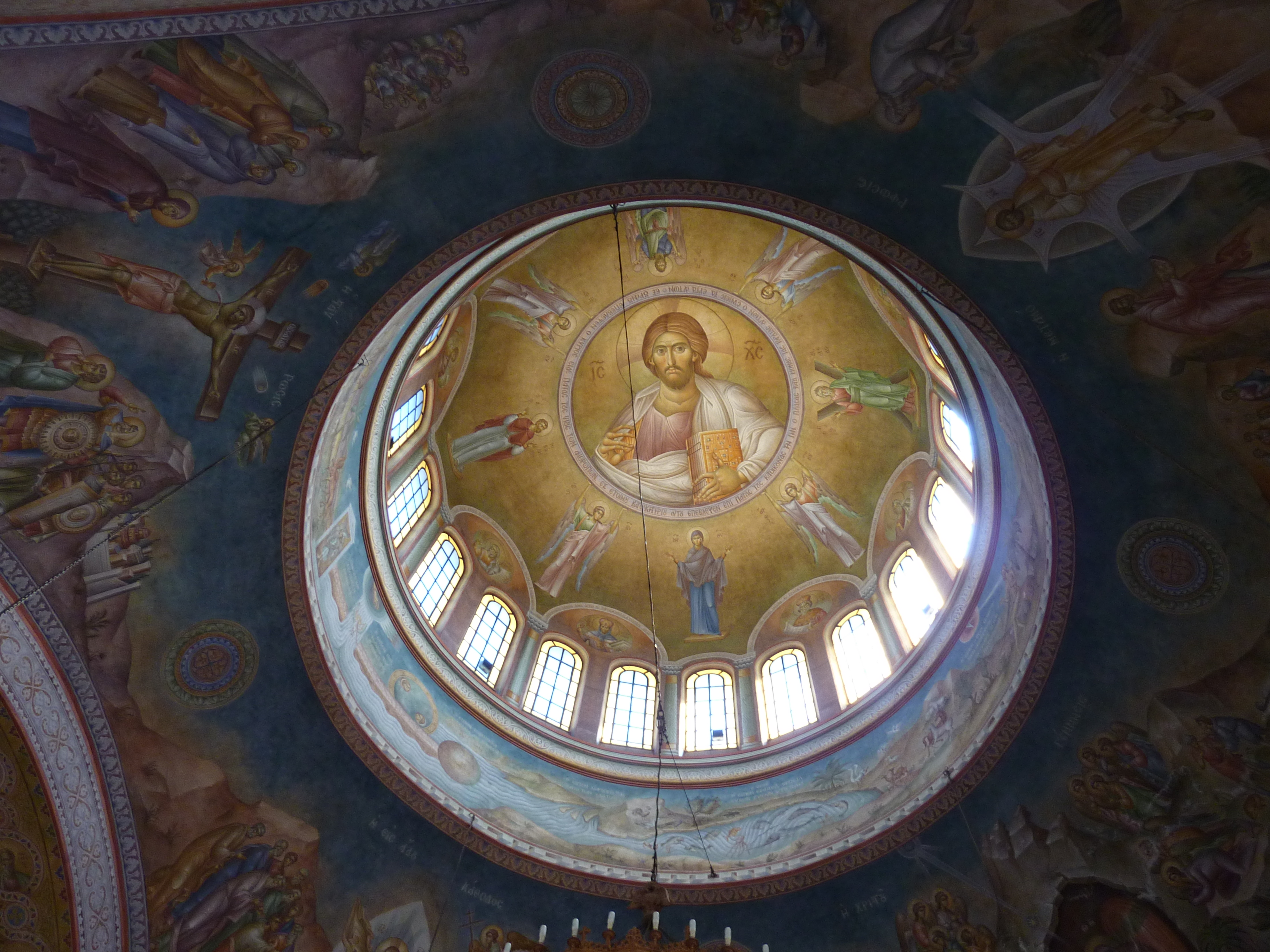 Kuppel von Hagios Andreas in Patras